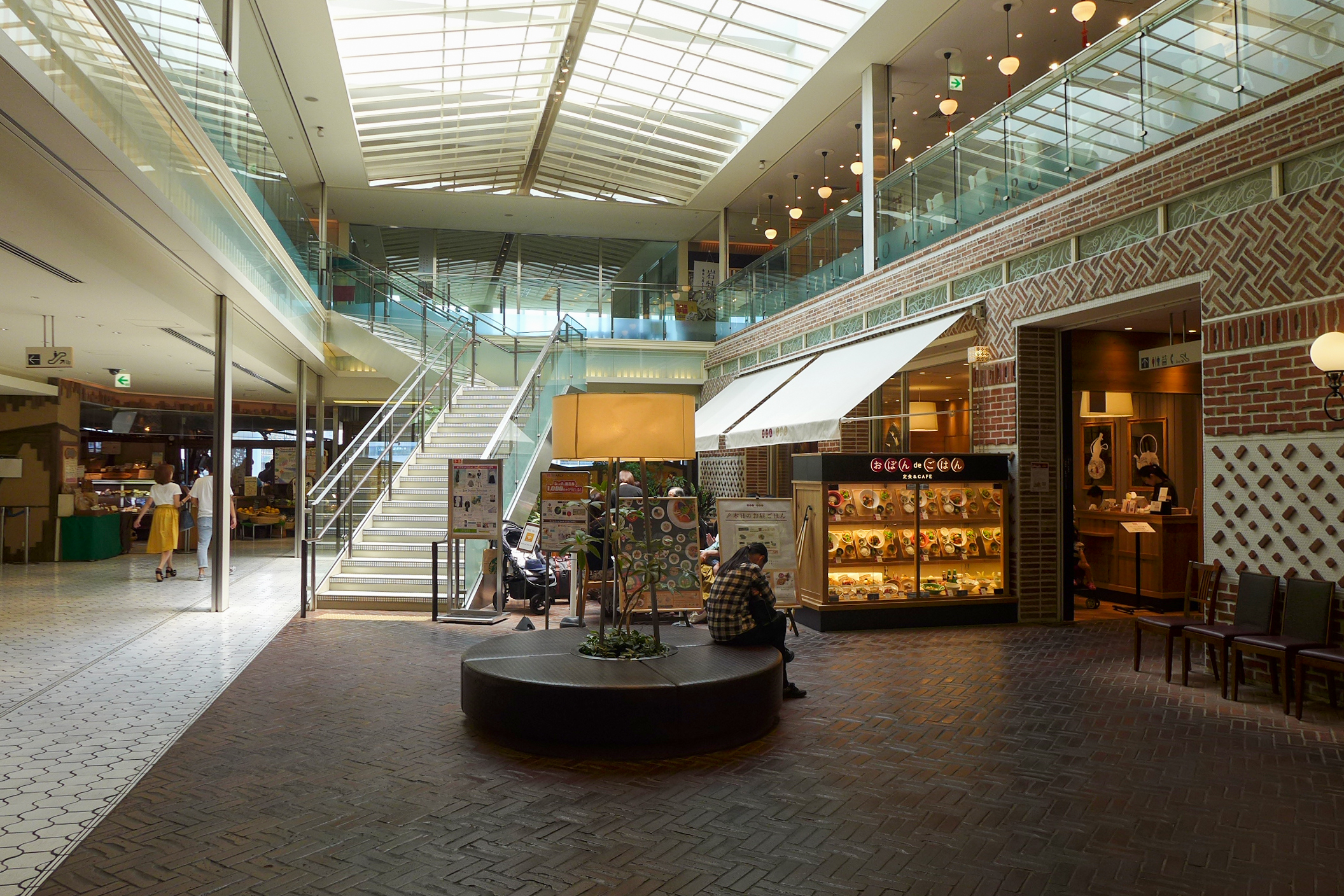 LACHIC